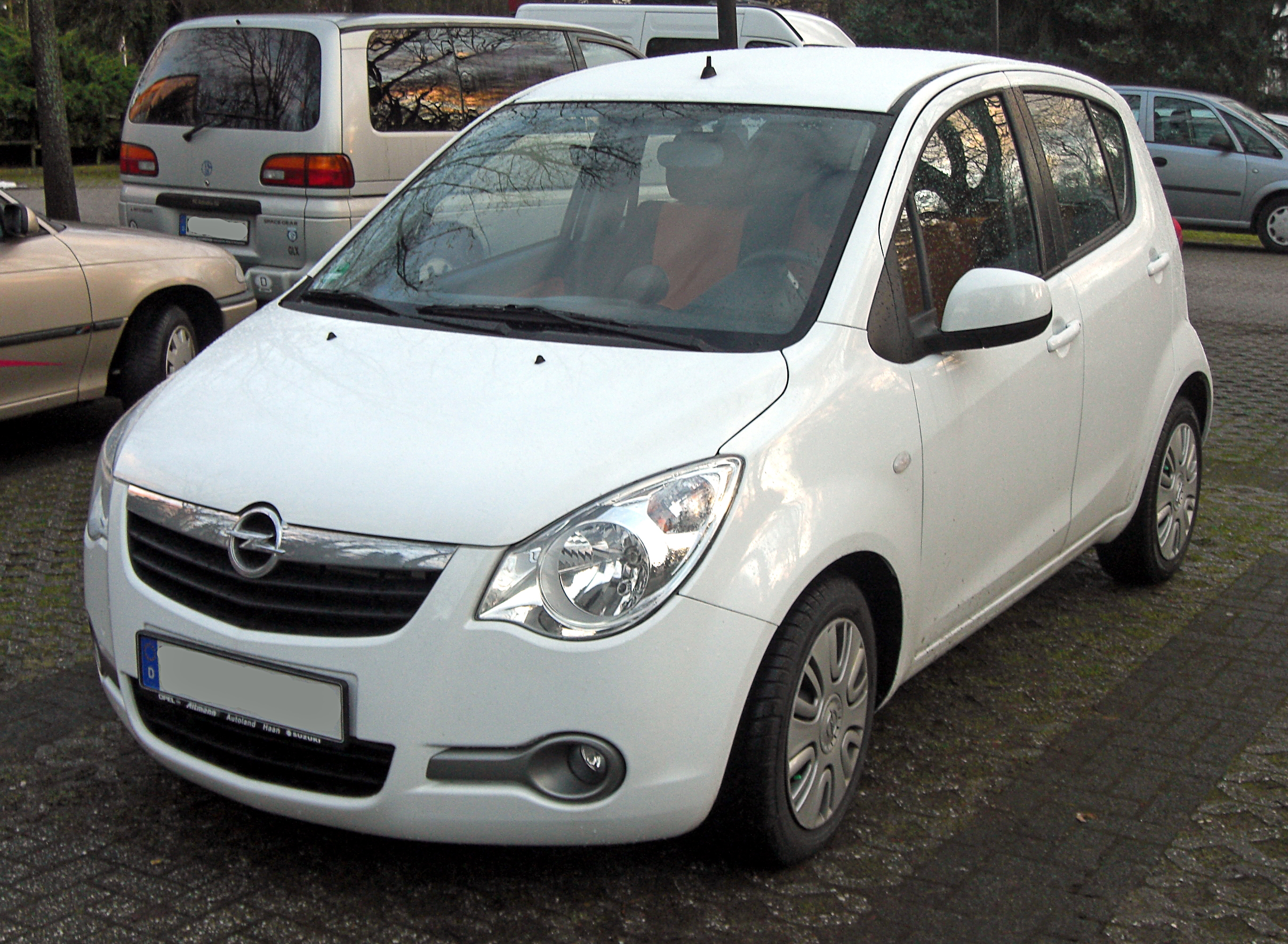 Opel Agila B